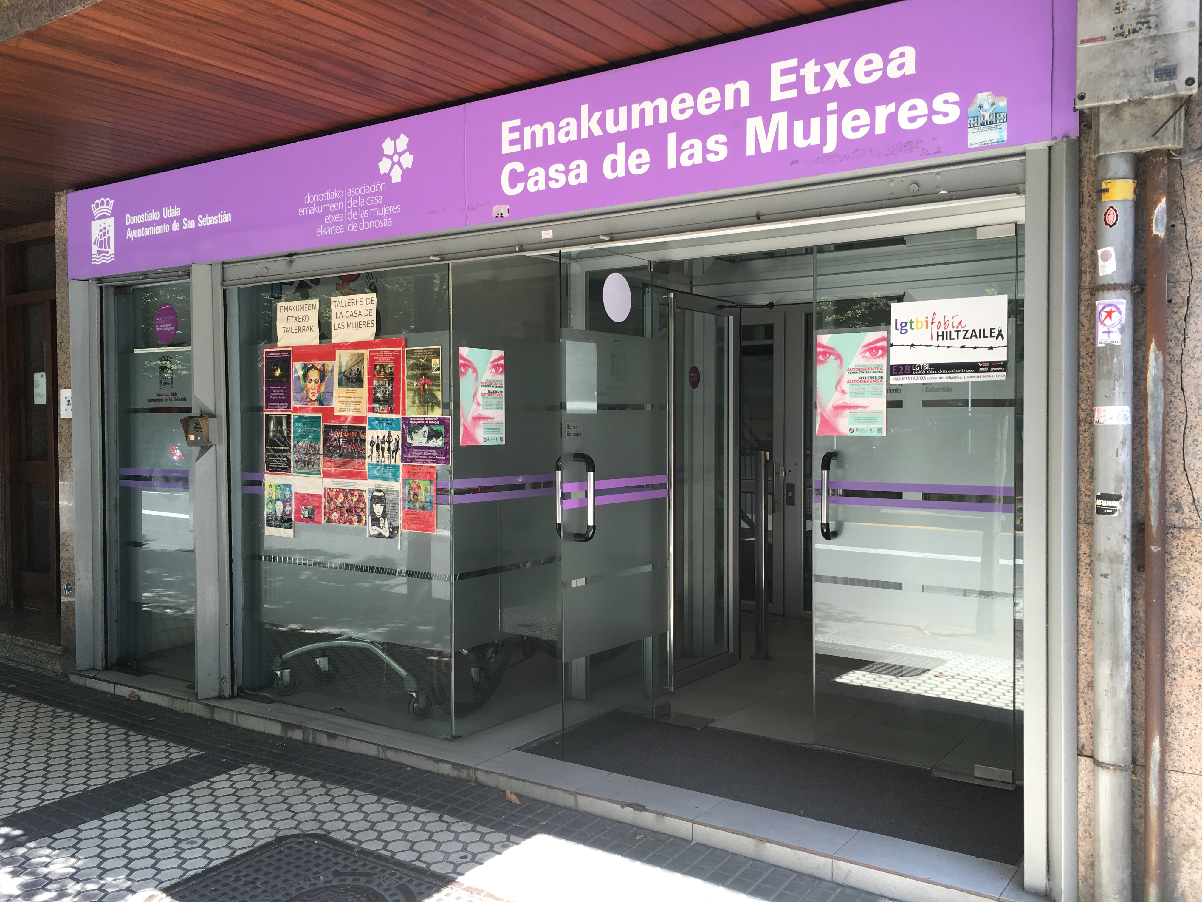 Emakumeen Etxearen kanpoaldea, Okendo kalea 9